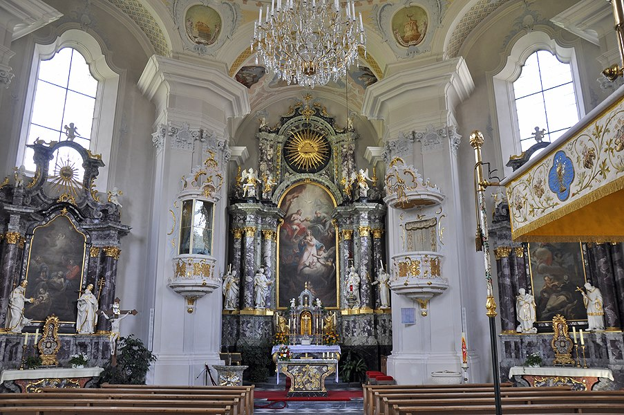 Innenansicht